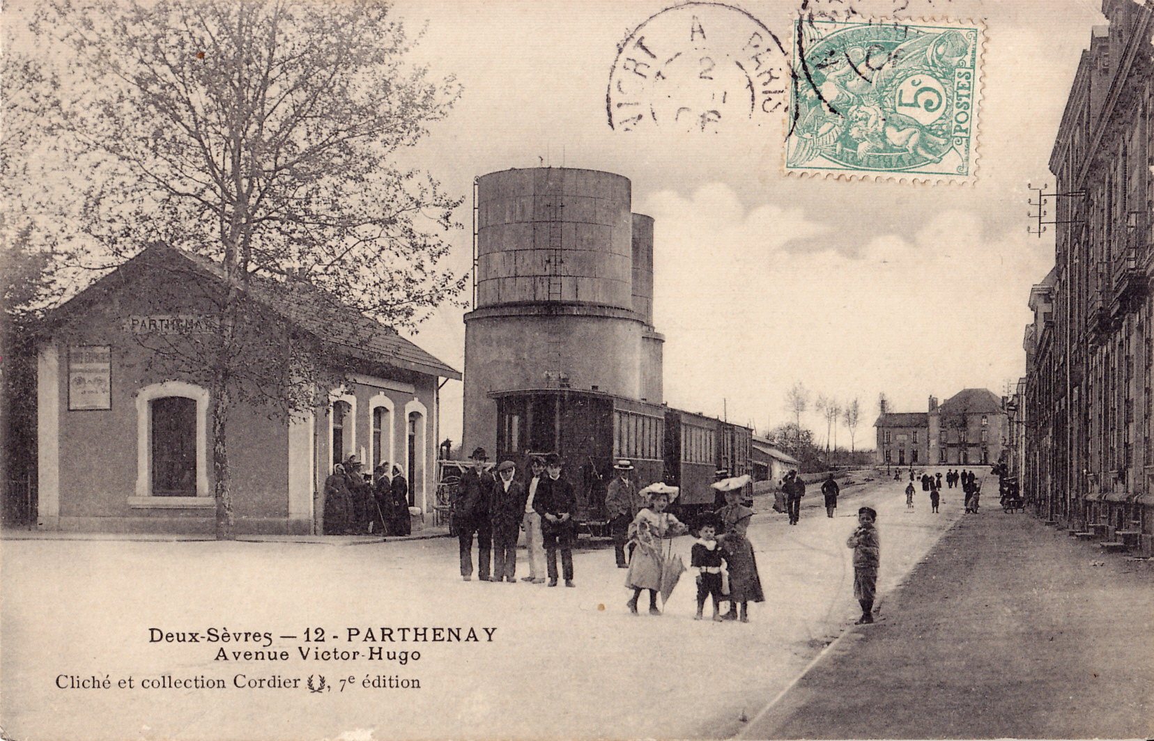 Carte postale ancienne éditée par Cordier :PARTHENAY - Avenue Victor-Hugo